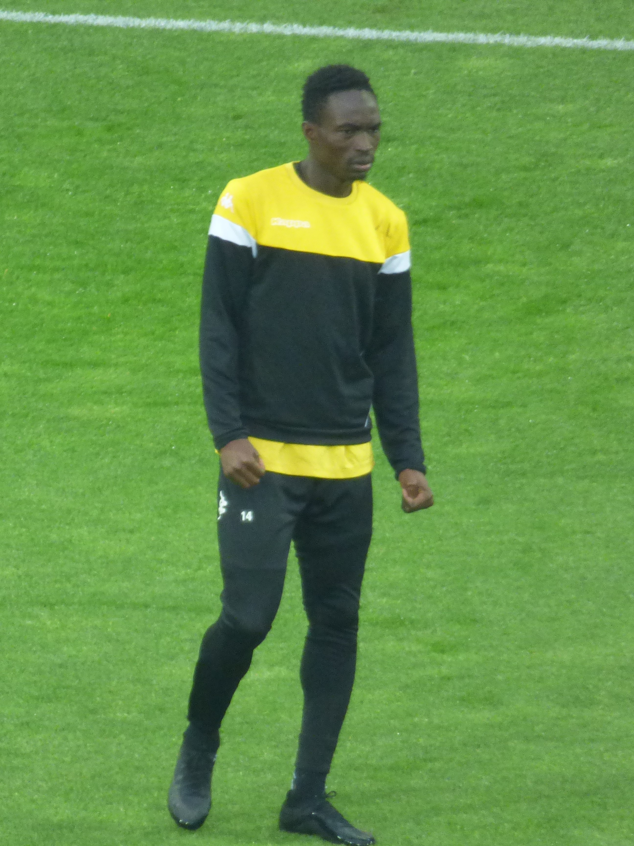 Adama Traoré avant le match RC Lens / US Orléans, le 17 mai 2019, comptant pour la 38ème journée du championnat de France de football de Ligue 2 2018-2019, au Stade Bollaert-Delelis.